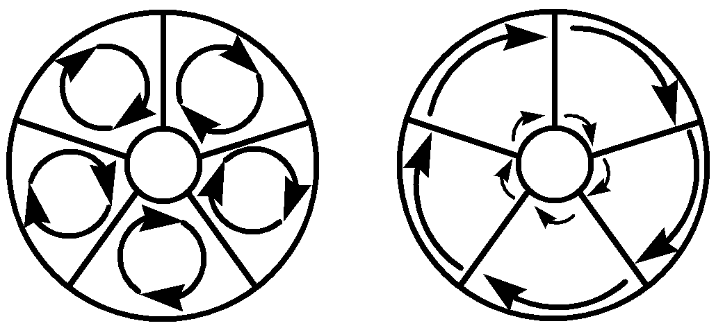 Perimeter von Circulenen